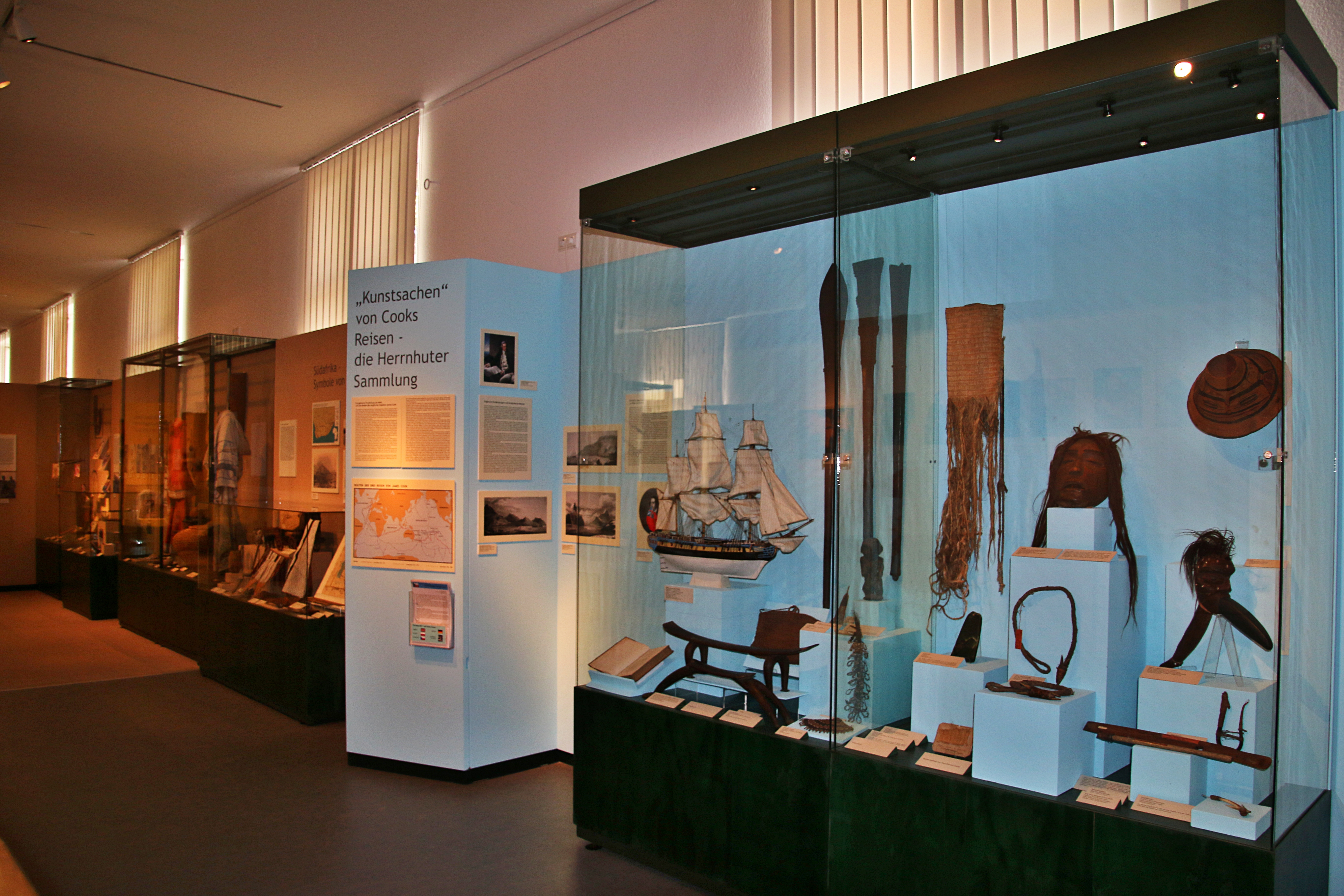 Völkerkundemuseum Herrnhut Innen